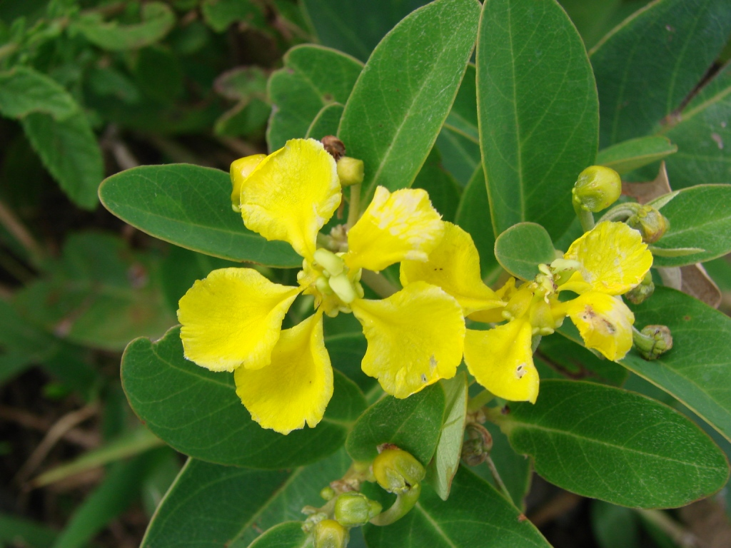 Stigmaphyllon paralias - MALPIGHIACEAE - Parque Nacional da Chapada Diamantina - Palmeiras - Bahia - Brasil.